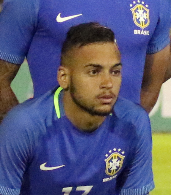 ECUADOR VS BRASIL 14 MAV